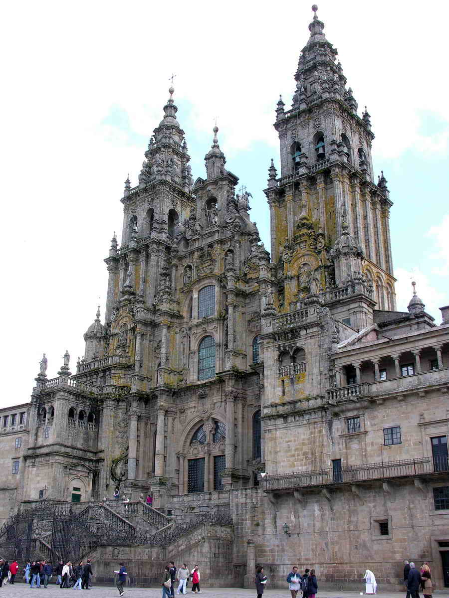 Santiago de Compostela - Galicia - España (Spain)